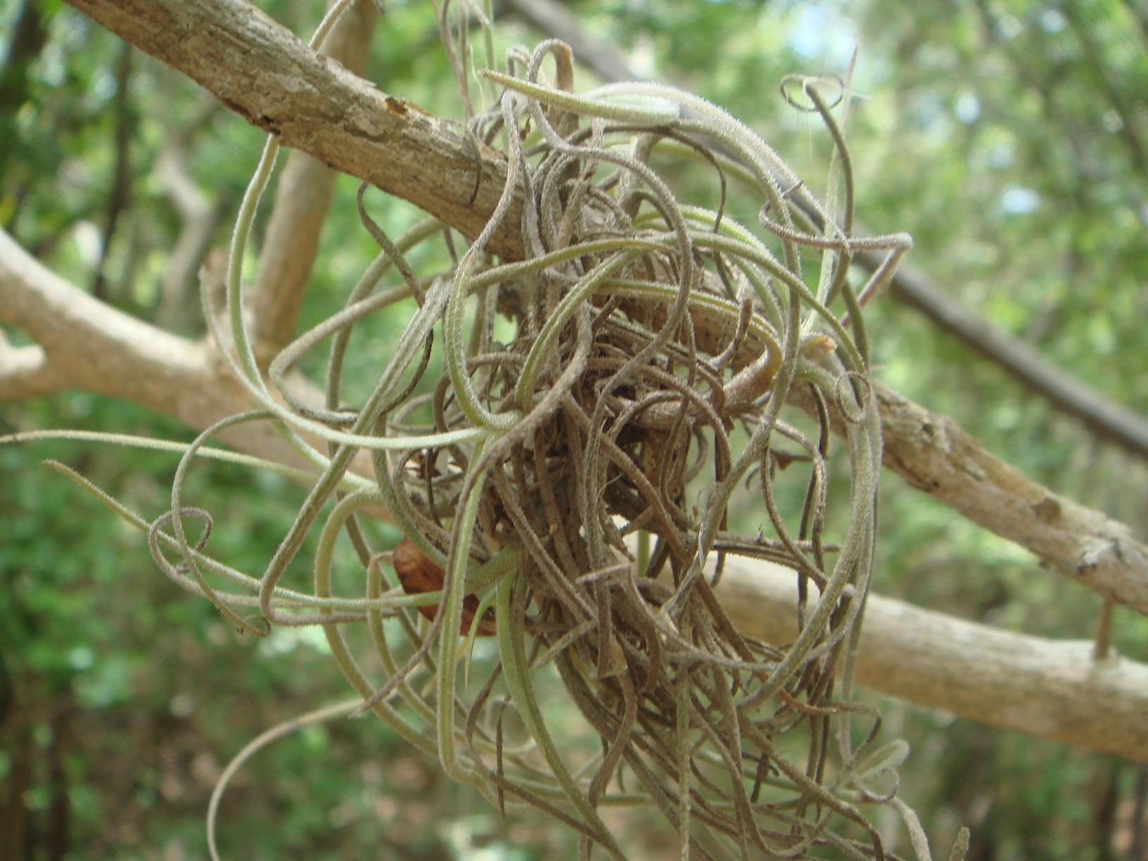 Bromelia (Tillandsia recurvata), Bosque seco tropical de Guánica, Puerto Rico